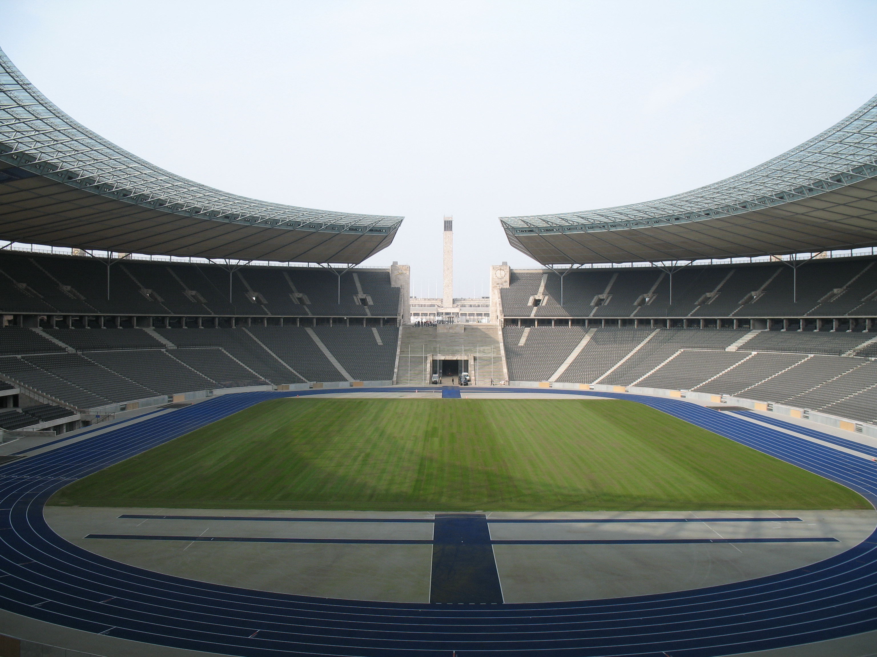 Olympiastadion Berlin kurz vor der WM 2006